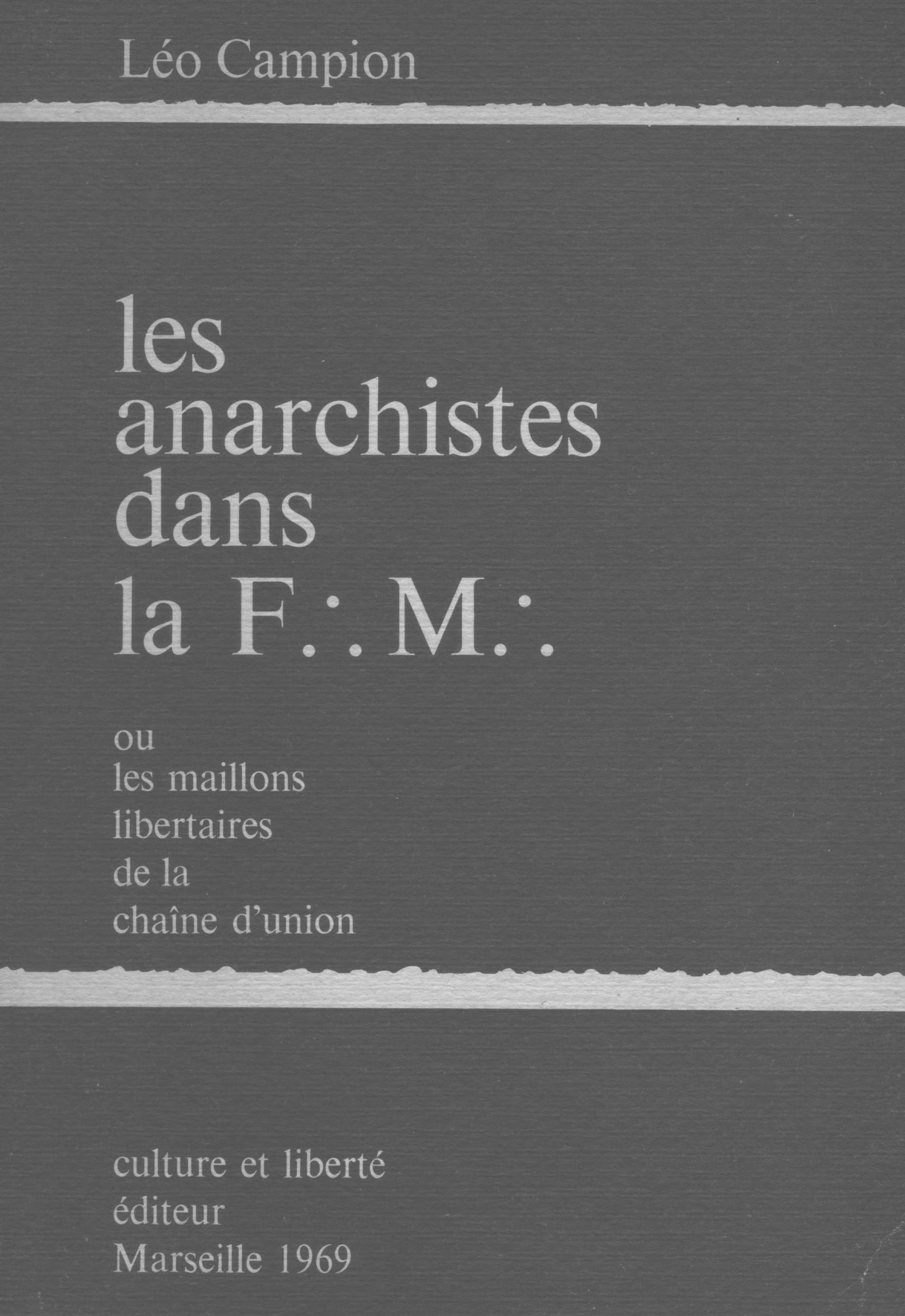 Léo Campion, Les Anarchistes dans la franc-maçonnerie : ou les Maillons libertaires de la chaîne d'union, Marseille, Culture et Liberté, 1969, 176 p.